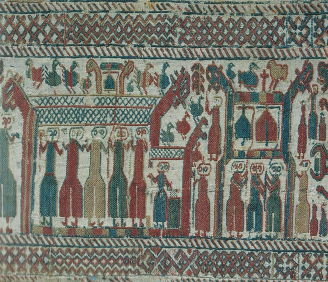 Klokker og klokketårn på bildevev fra Skog, utstillt Nordiska Museet Stockholm